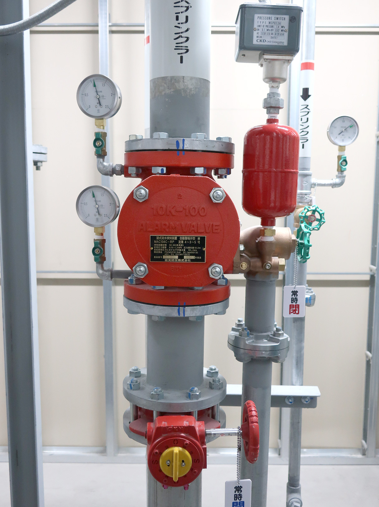 消火スプリンクラーの湿式流水検知装置